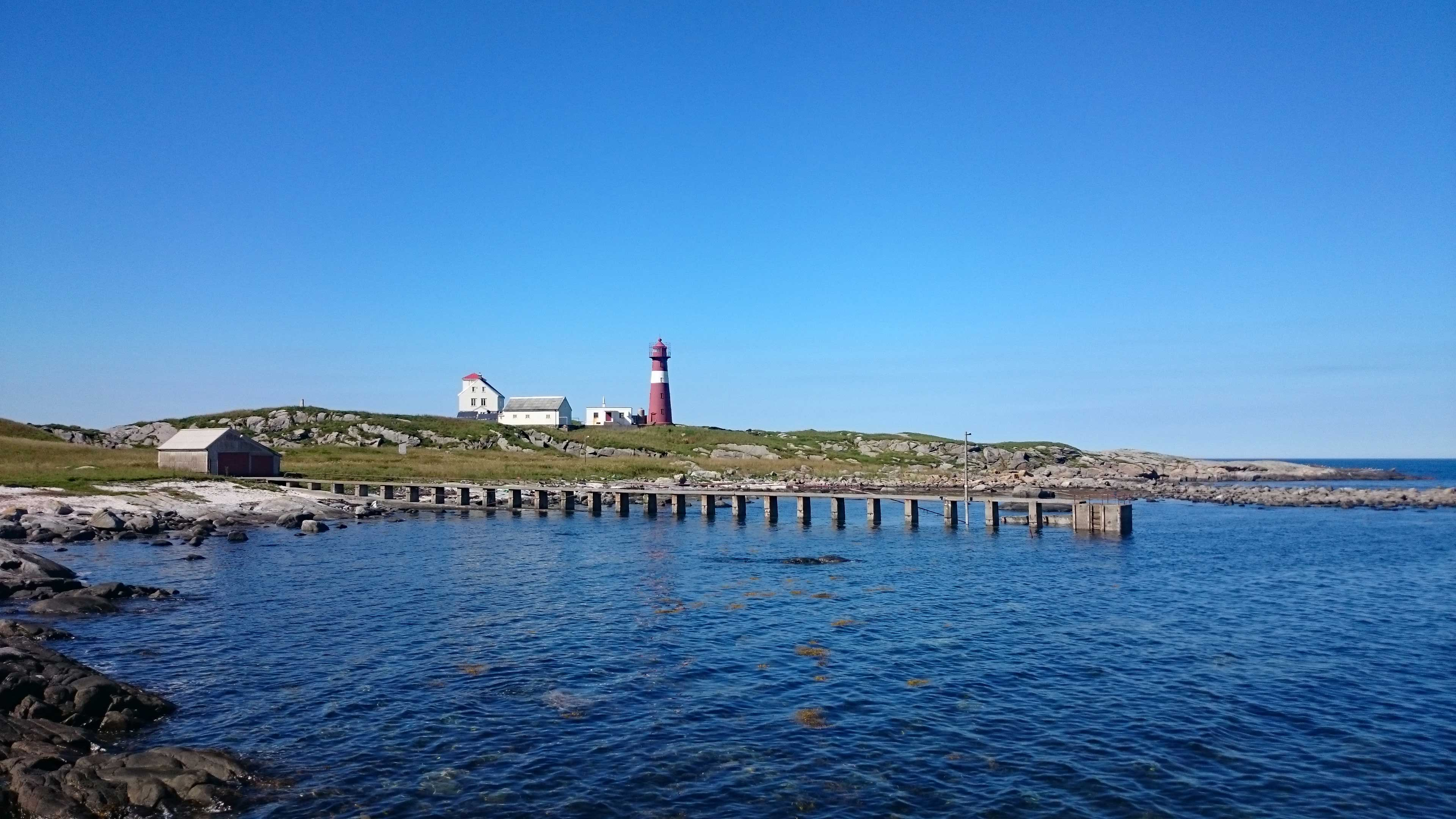 Grasøyane fyr. Det gamle lyktehuset frå 1886 stod på toppen av fyrvokterboligen. Det røde støypejernstårnet frå 1950 er det siste støypejernfyret som ble satt opp i Norge. I forgrunnen ligg den 90 m lange landinga